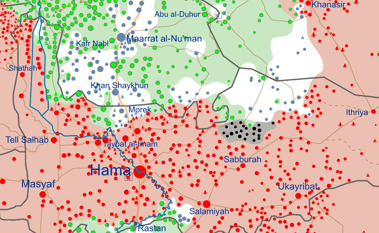 Région de Hama, en Syrie, à la date du 24 novembre 2017